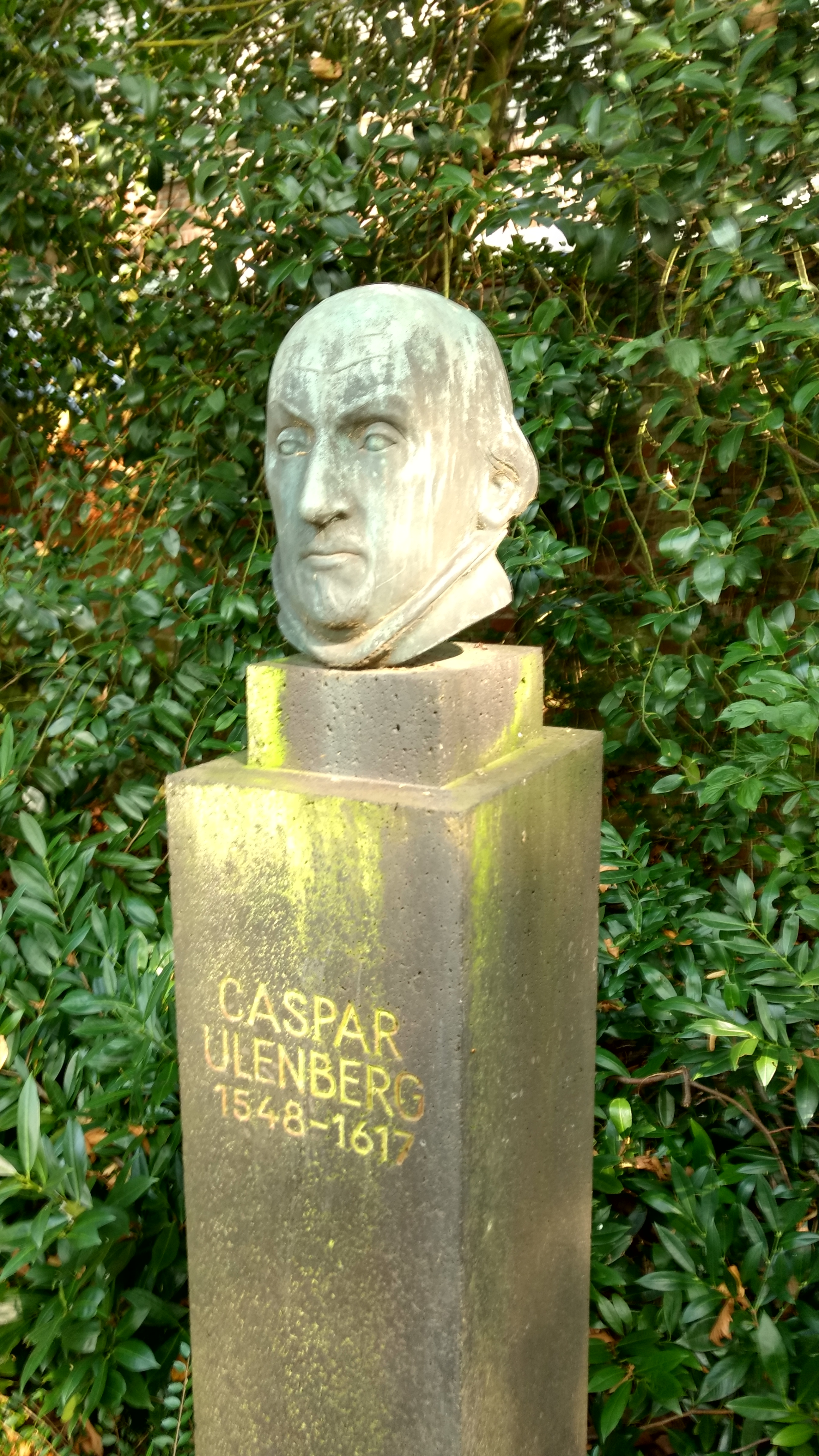 Kaiserswerth, Büsten berühmter Bürger der Stadt Kaiserswerth hinter dem Suitbertus-Gymnasium Caspar Ulenberg